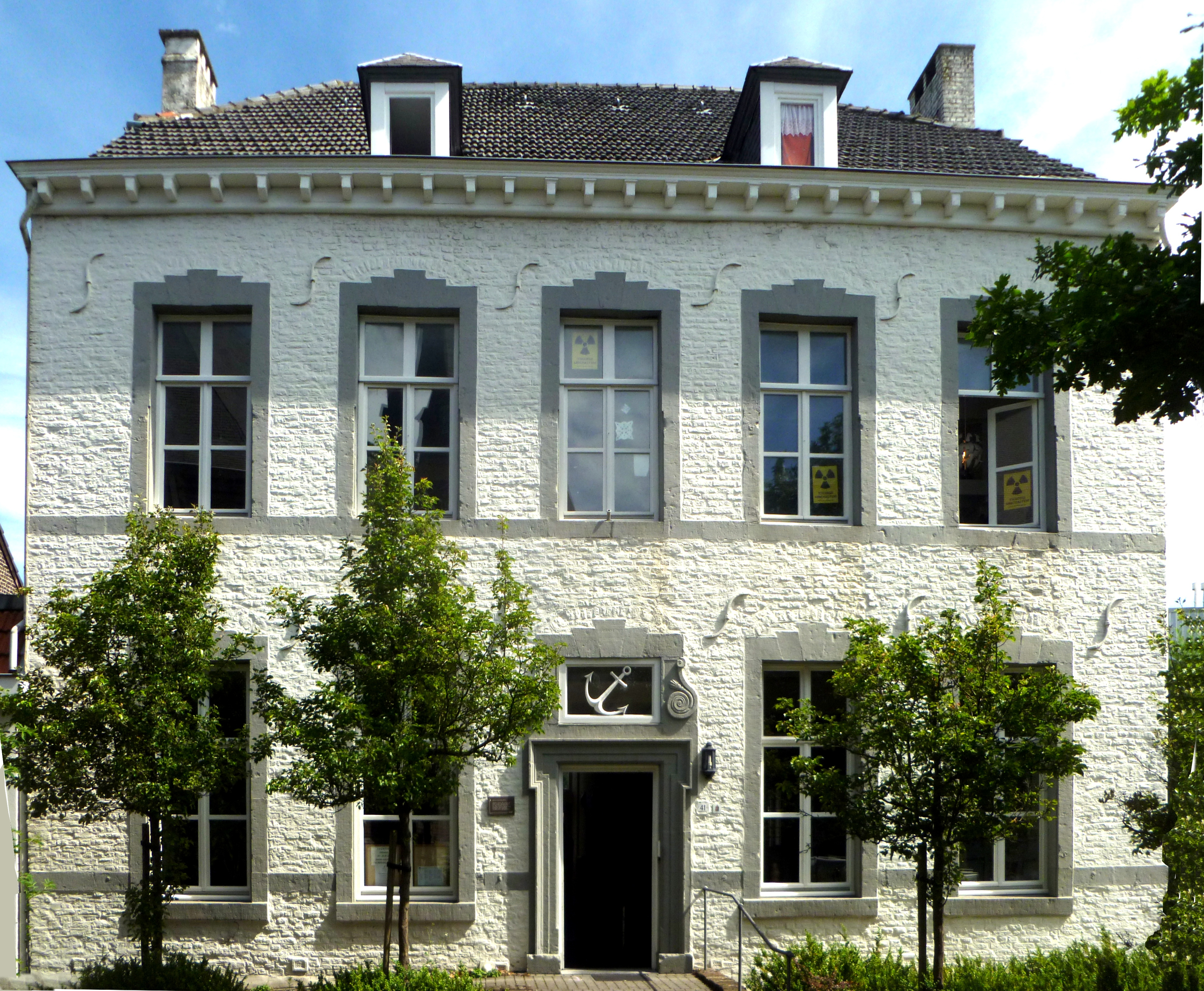 Pastorei der Hervormde Kerk in Vaals, Baujahr 1716/1717, Architekt: Laurenz Mefferdatis